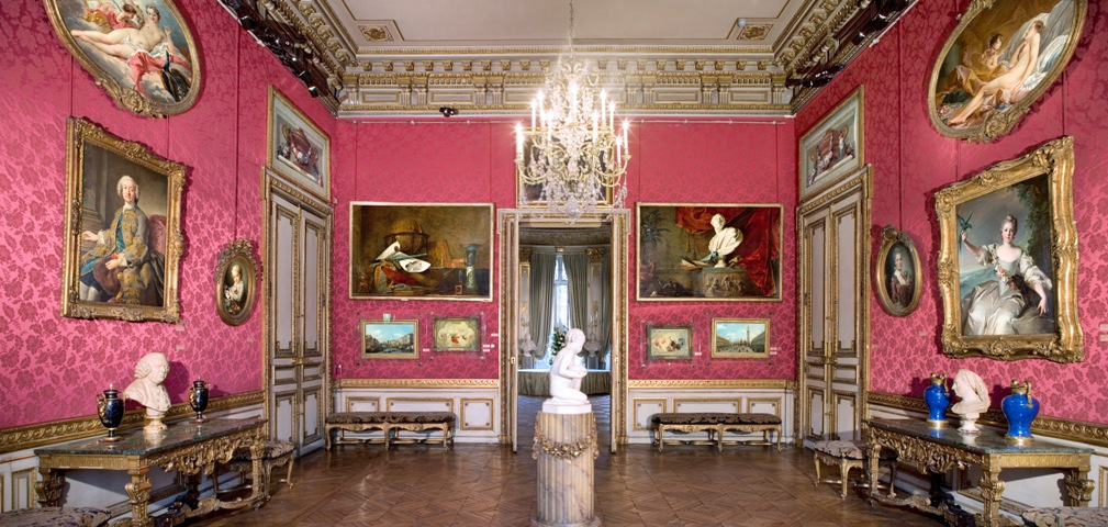 "Le salon des peinture"